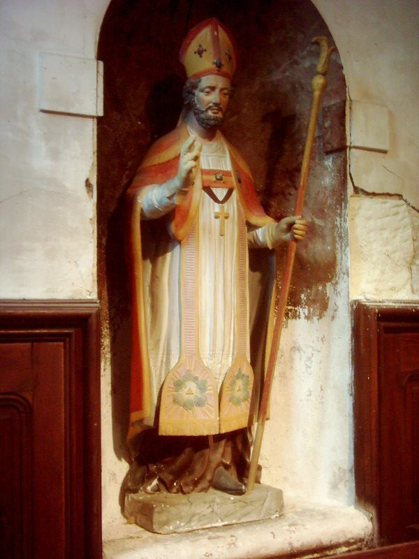 statue de Saint Martin dans le baptistère de l'église paroissiale de Coulanges, avant la restauration de 2010